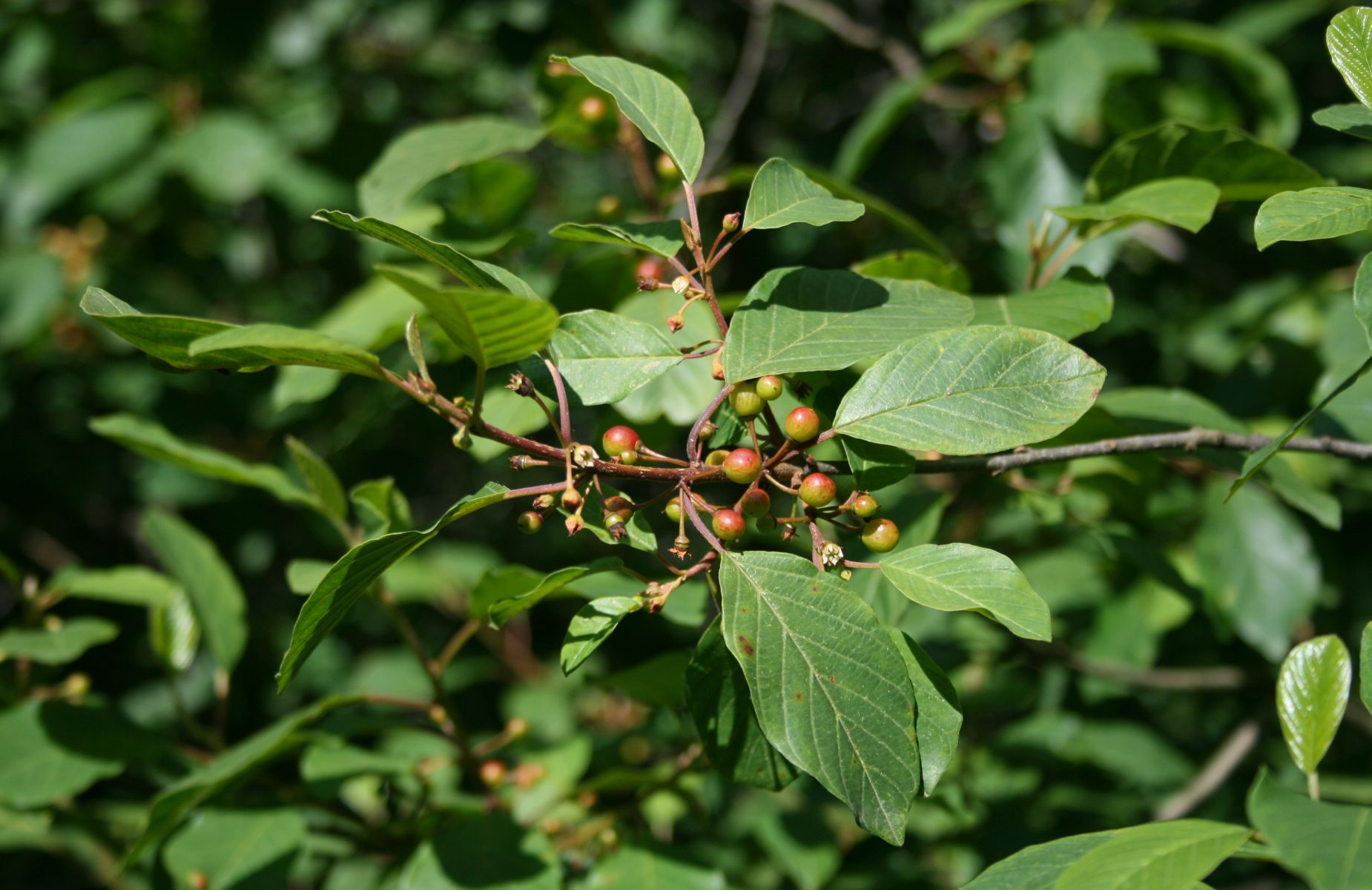 Faulbaum (Frangula alnus), Kreuzdorngewächse (Rhamnaceae) - Österreich/Austria/Autriche: Oberösterreich, Hausruckviertel, Kien NW Attnang-Puchheim